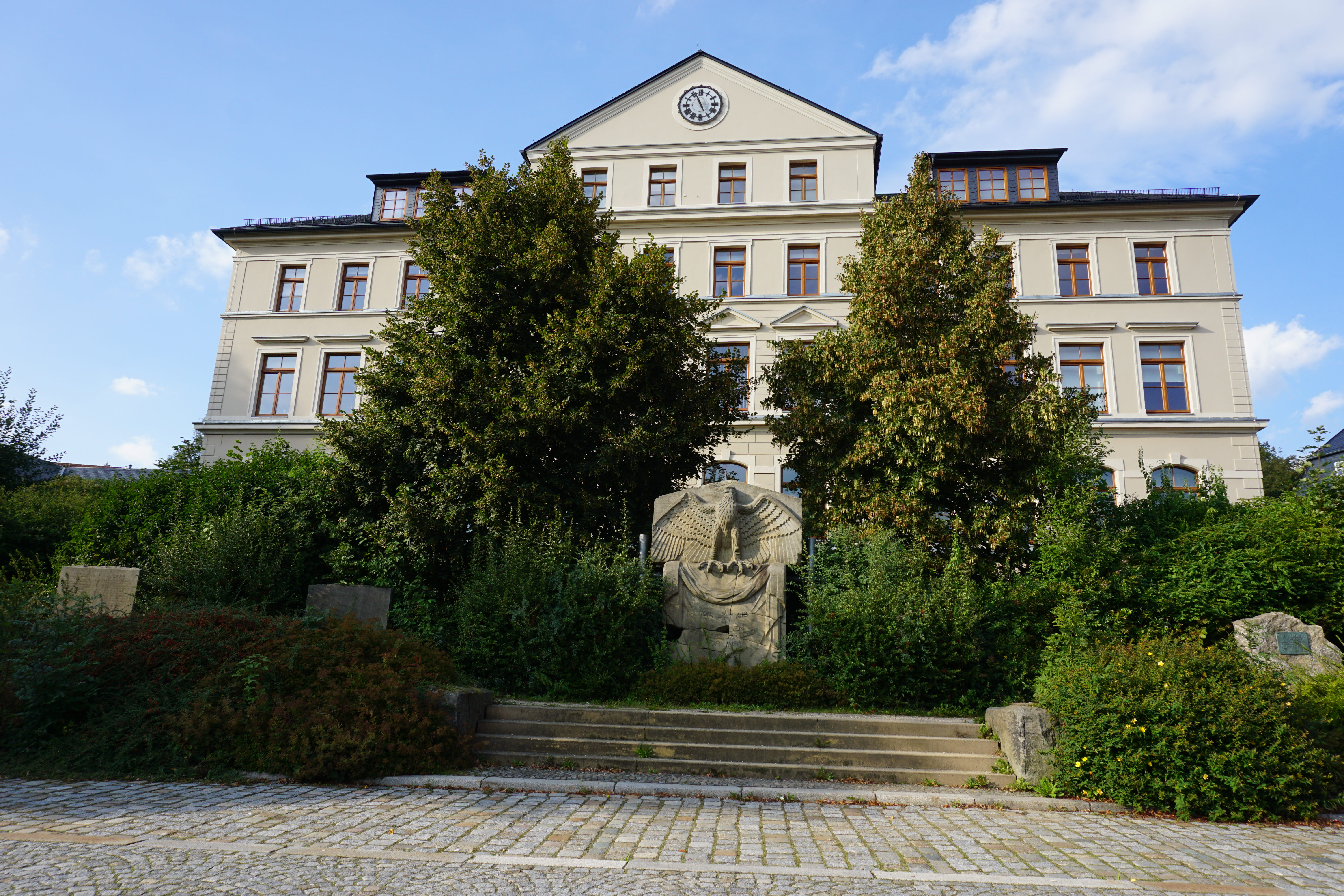 Denkmal der Kriegsgefallenen aus Burkhardtsdorf aus dem Ersten Weltkrieg. In Hintergrund steht die im Zweiten Weltkrieg zerstörte und wiederaufgebaute Kurt-Richter-Schule.